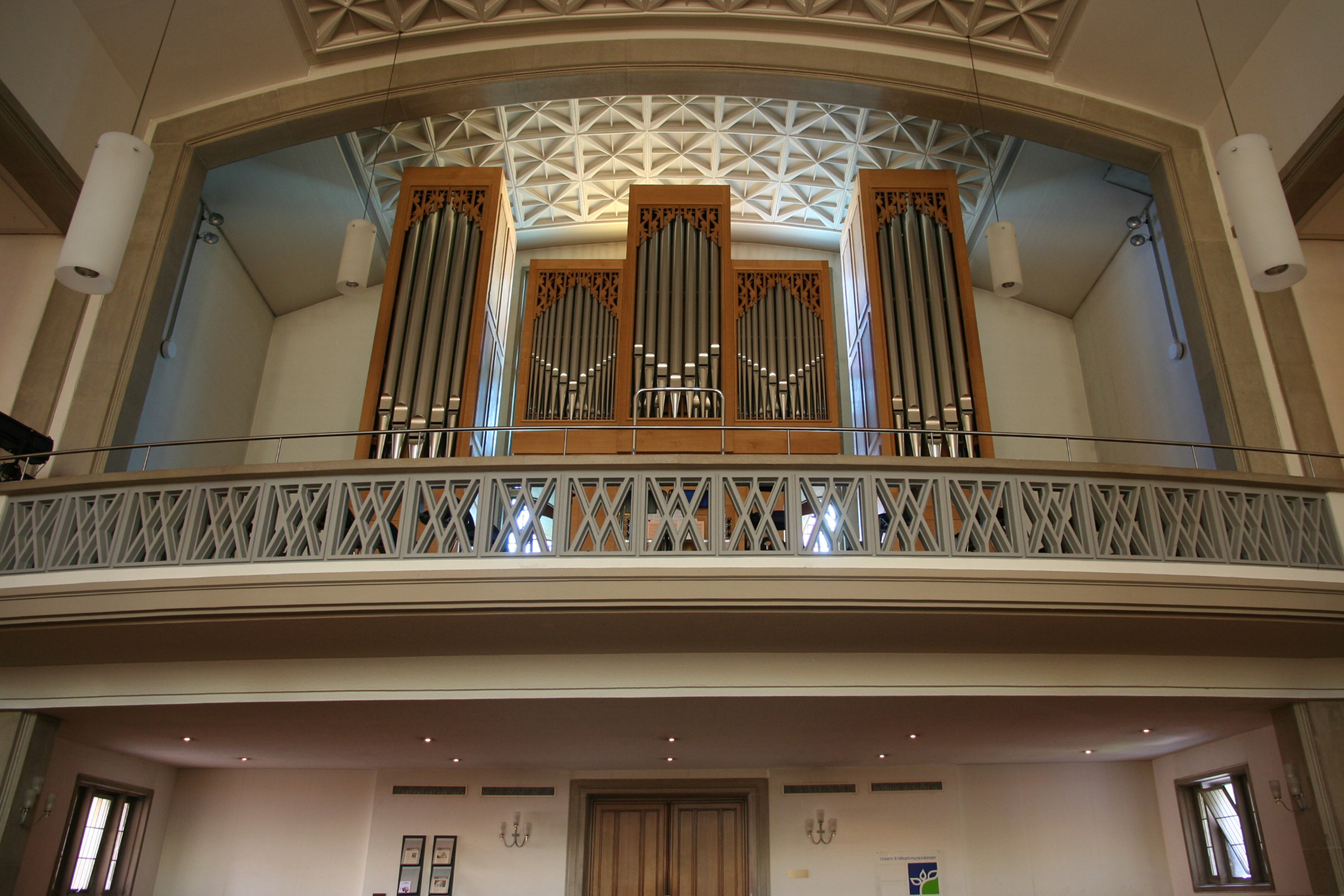 Römisch-Katholische Kirche St. Konrad Zürich-Albisrieden